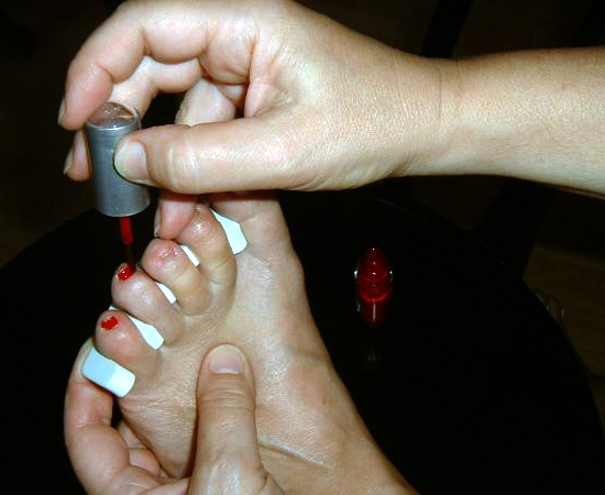 Zéiwenneel gi gefierft.